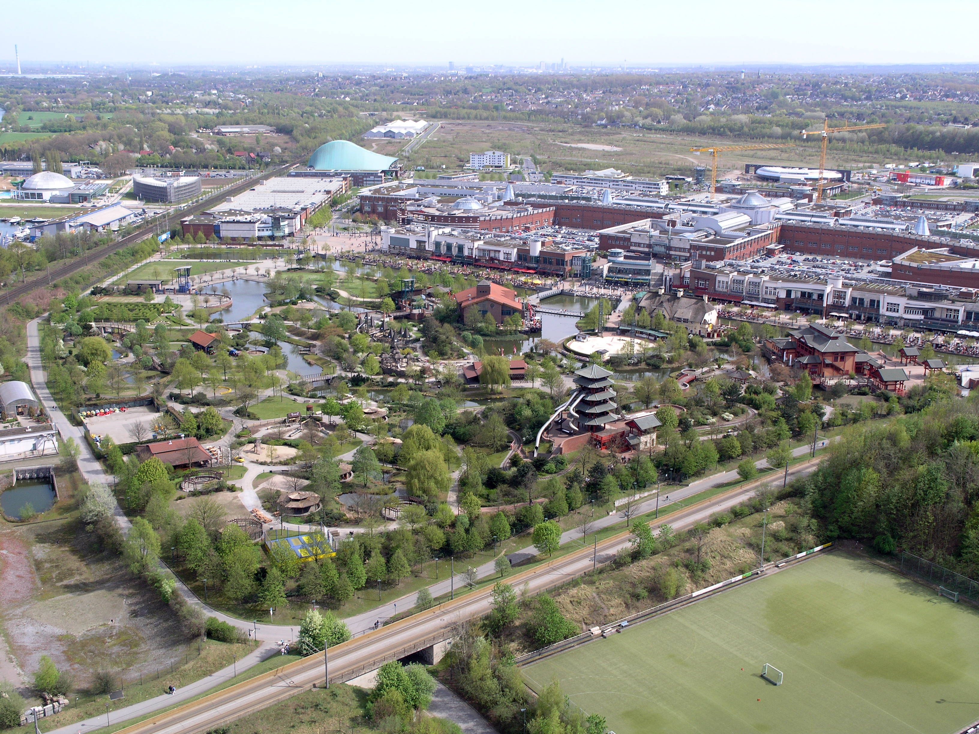 Северный Рейн - Вестфалия, Оберхаузен. CentrO (вид с Газометра)